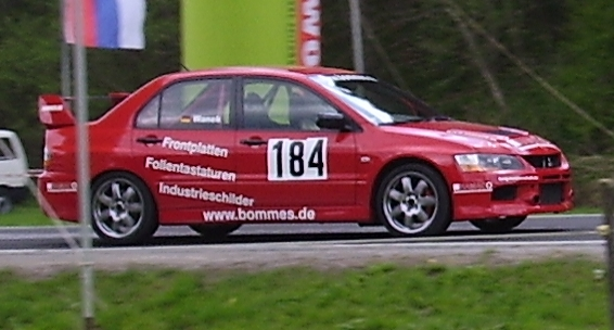 Roland Wanek im Mitsubishi Lancer EVO IX RS beim Start in Rechberg 2009